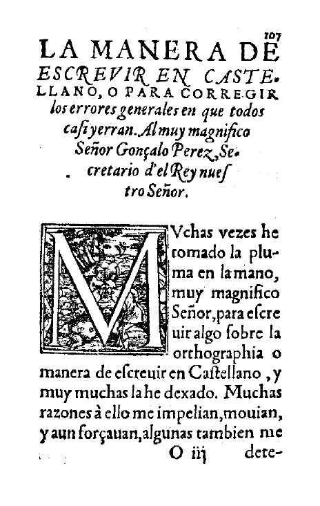 Portada de l'opuscle "La manera de escrevir en castellano, o para corregir los errores generales en que todos casi yerran", de Joan Martí Cordero, inclòs a Las qvexas y llanto de pompeyo adonde brevemente se muestra la destrucion de la Republica Romana. Y el hecho horrible y nunca oido de la muerte d’el hijo d’el gran Turco Solimano dada por su mismo padre, con vna declamacion de la muerte por consolacion de vn amigo. En Anvers: En casa de Martin Nucío, 1556. fol. 107r-124v